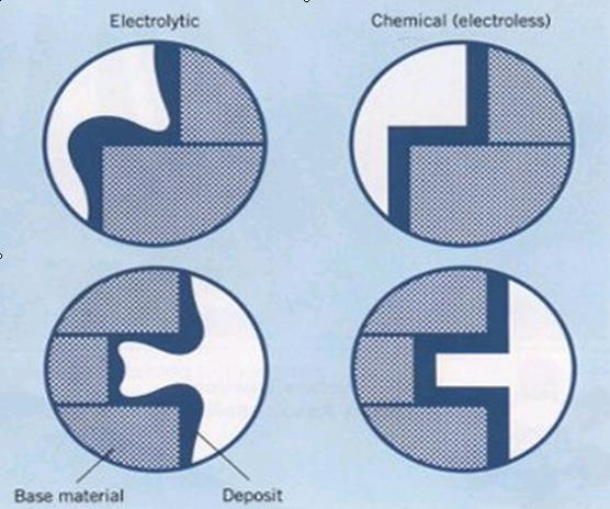 schéma electroless nickel